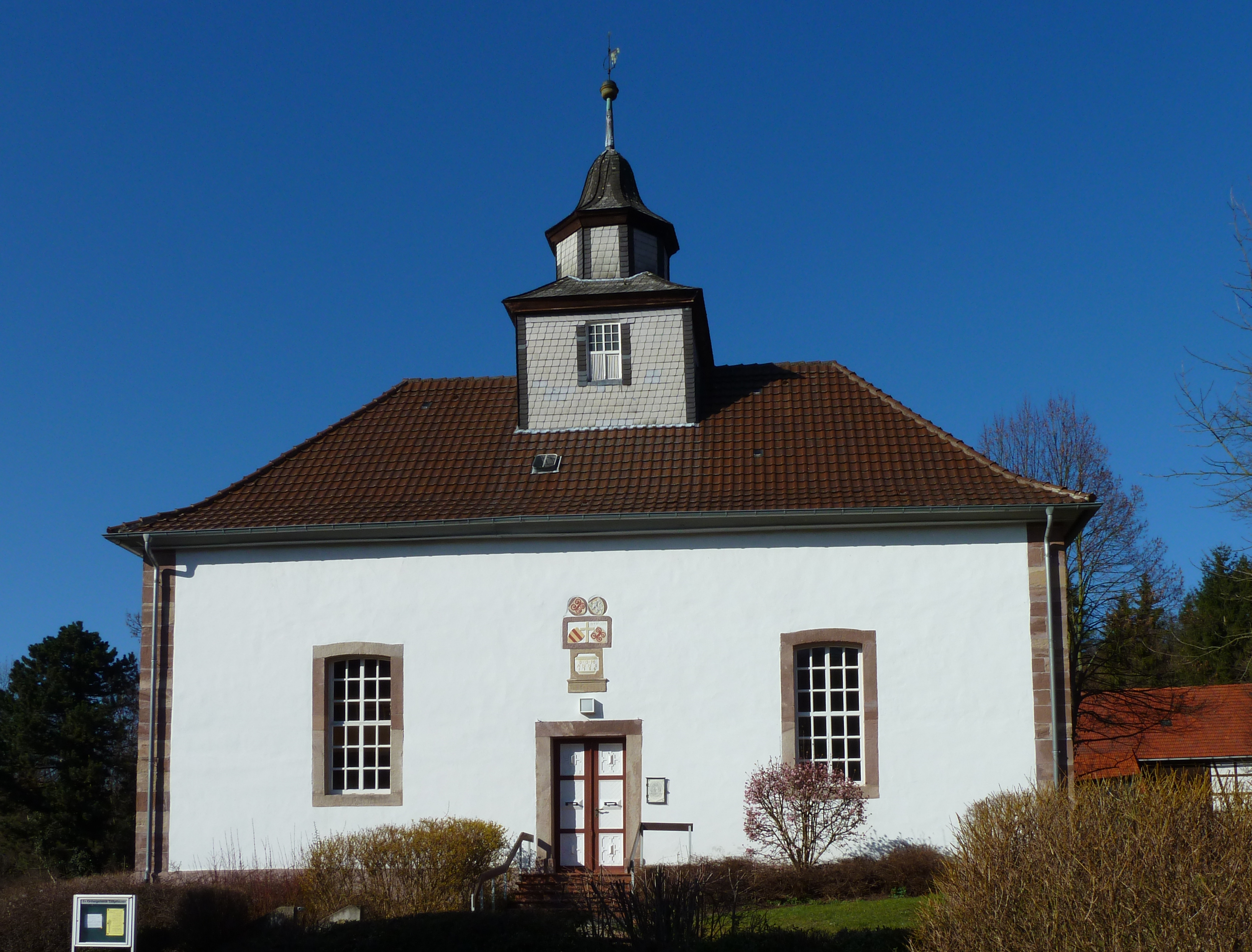 Evangelisch-reformierte Kirche St. Blasius in Eddigehausen, Flecken Bovenden, Niedersachsen. Erbaut 1786 unter Verwendung älterer Spolien. 1211 erstmalige Erwähnung der Eddigehäuser Kirche als Mutterkirche der Bovender Kapelle